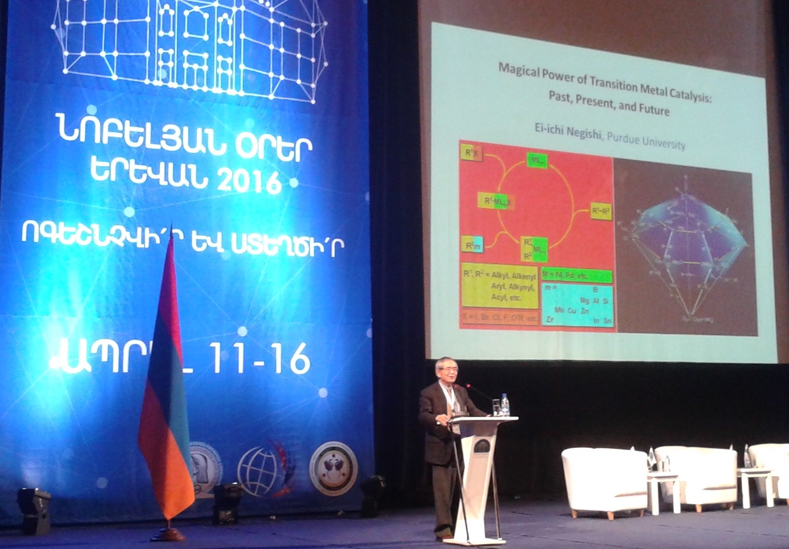 Էյ-Իչի Նեգիշին Երևանում Նոբելյան օրերին, 11-16.04.2016